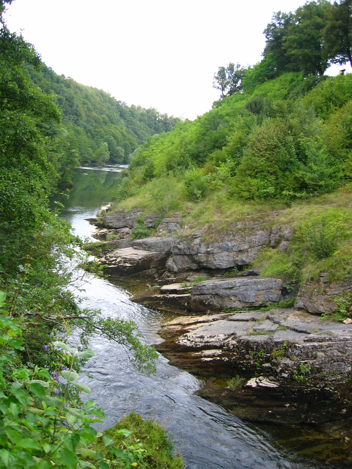 Korana canyon at Slunj, Croatia